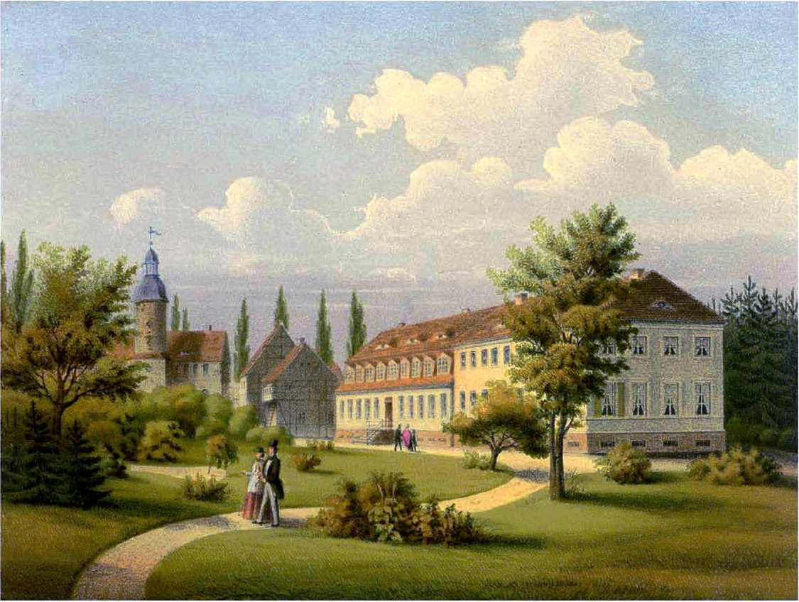 Schloss Baruth, Kreis Jüterbog-Luckenwalde, Provinz Brandenburg